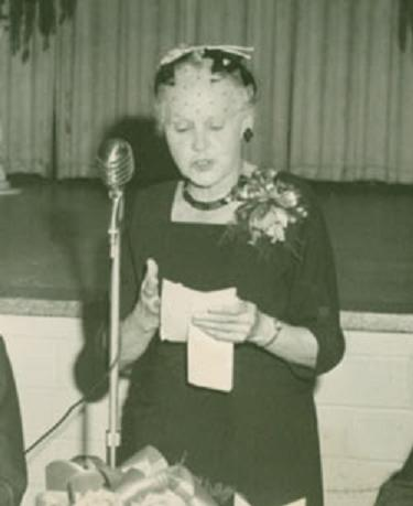 Laure Gaudreault, pionnière de la cause des institutrices québécoises, lisant un discours à l'occasion du banquet du congrès de la Corporation générale des instituteurs et institutrices catholiques de la province de Québec (CIC) en 1959